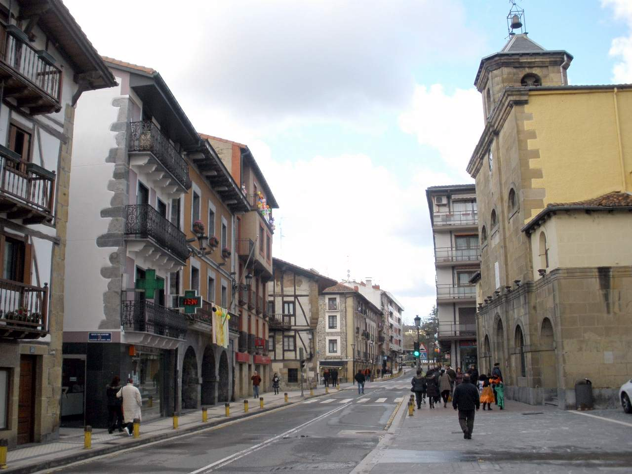 Lasarte-Oria (Gipúzkoa)